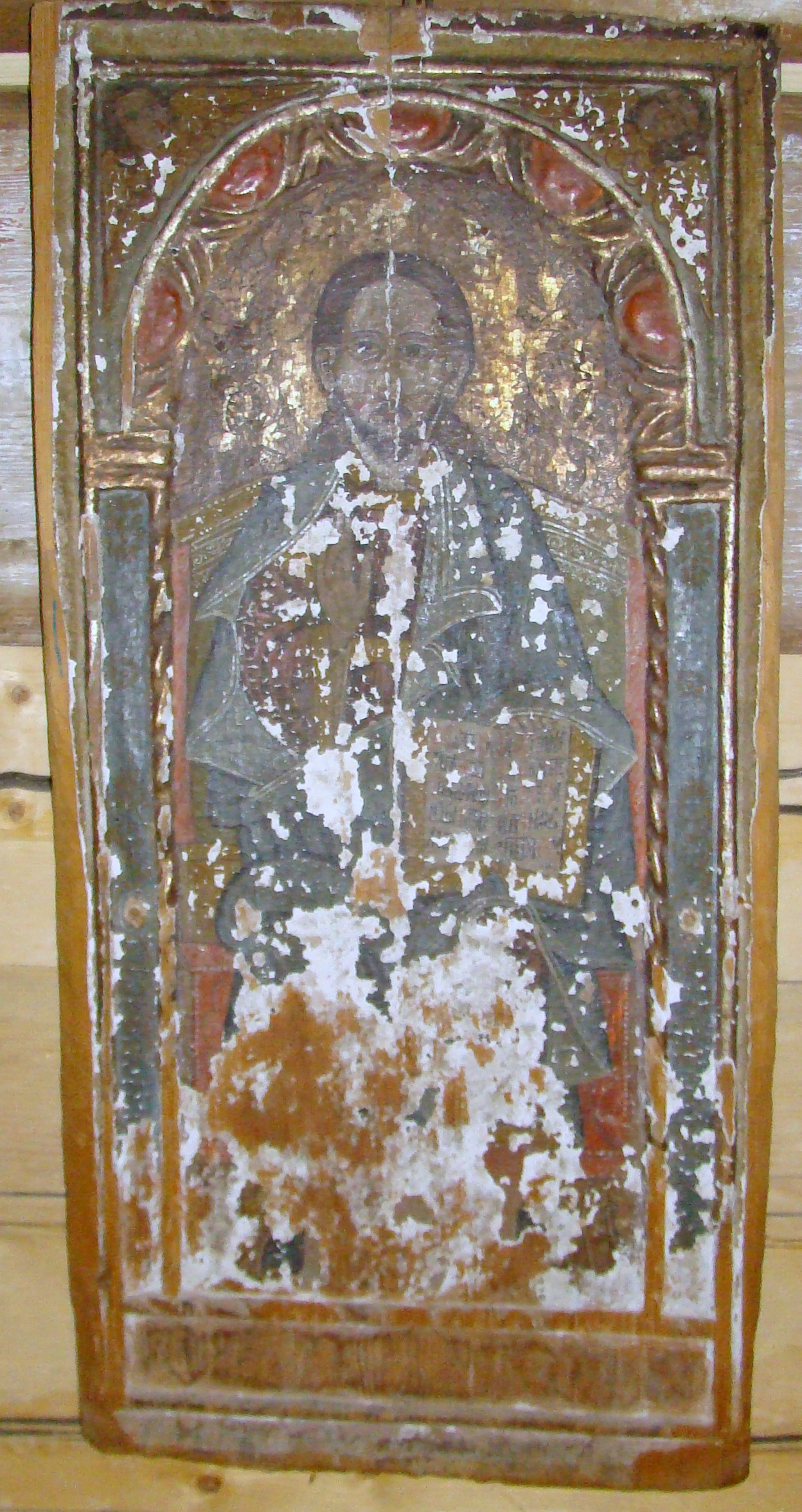 Biserica de lemn "Adormirea Maicii Domnului" a fostei mănăstiri "Izvoru Negru" , sat MOISEI 01